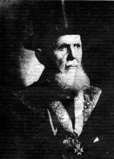 Maestro Huiracocha - Fundador de la F.R.A. en Latinoamerica